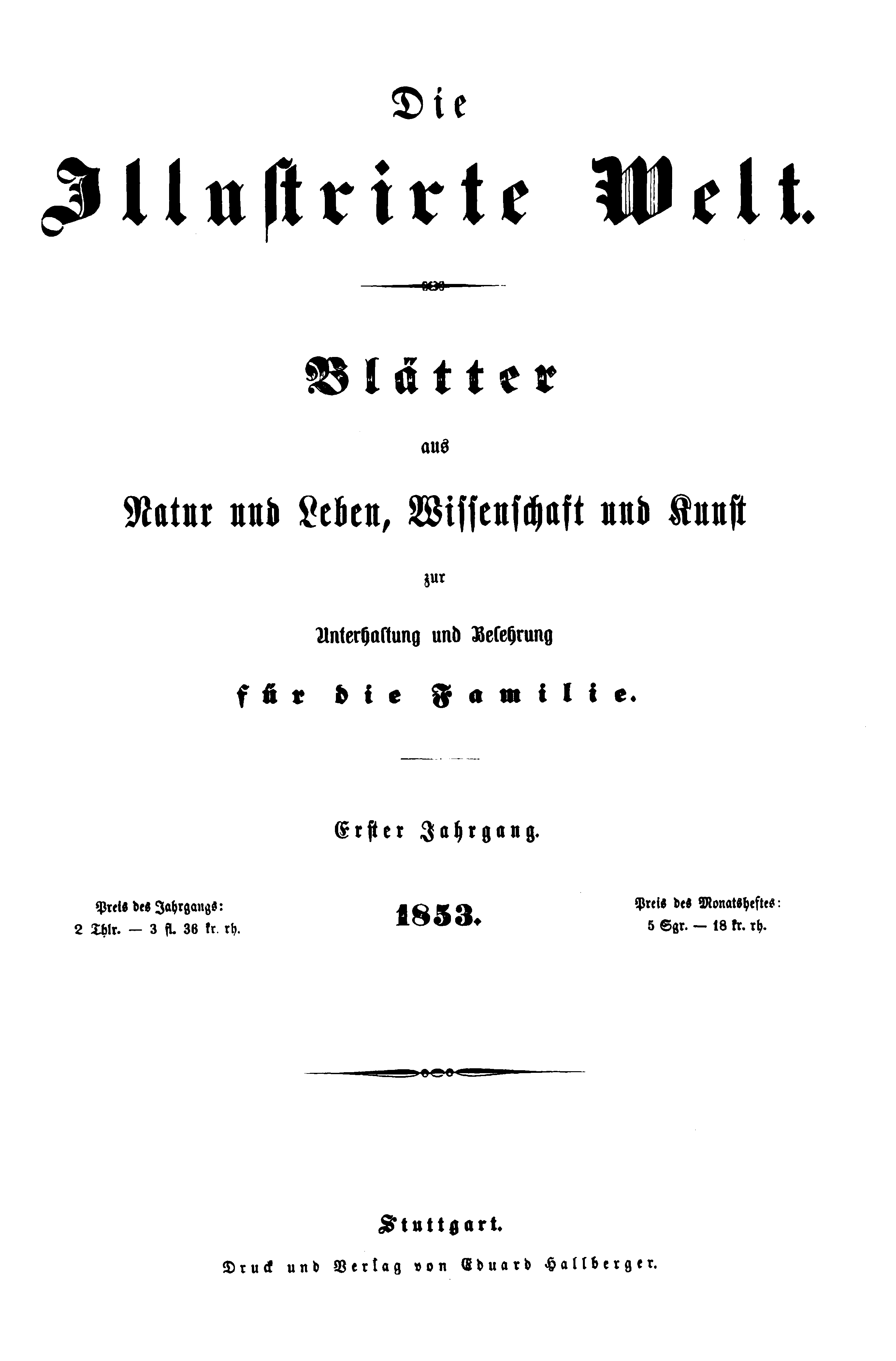 Titelseite der Zeitschrift / Title page of the periodical